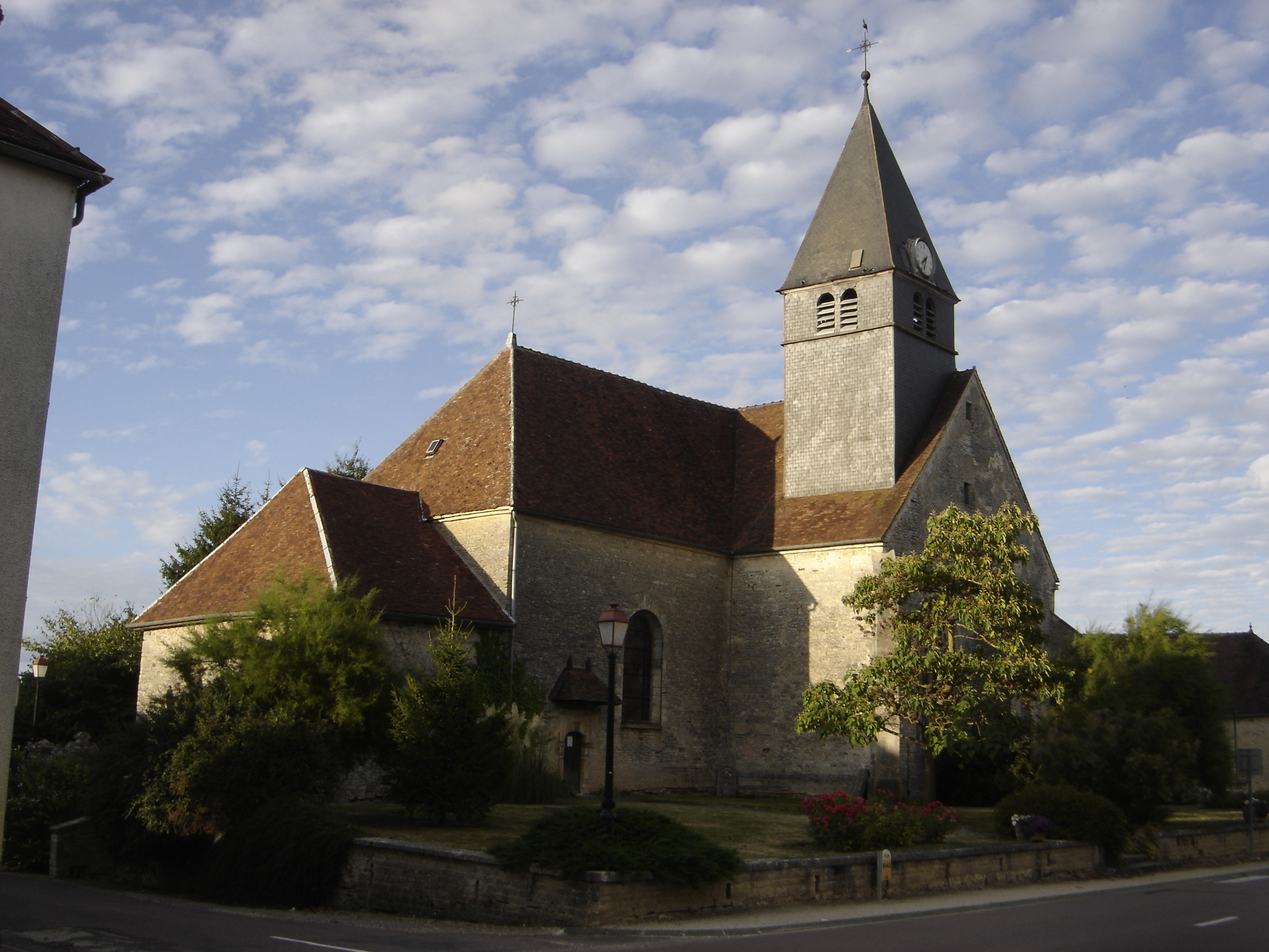 église de Magnant - Aube - France